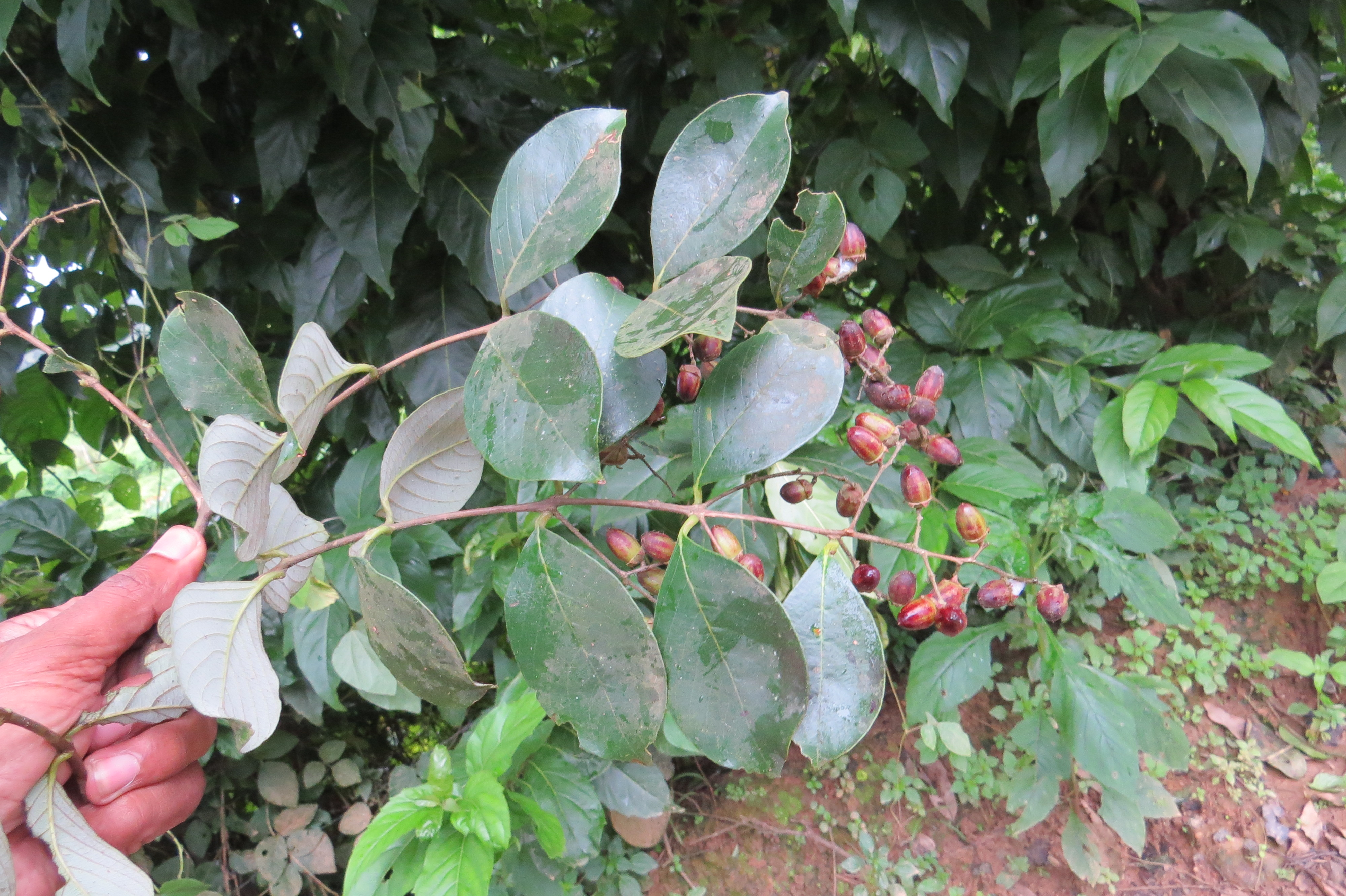 Photos by Vinayaraj